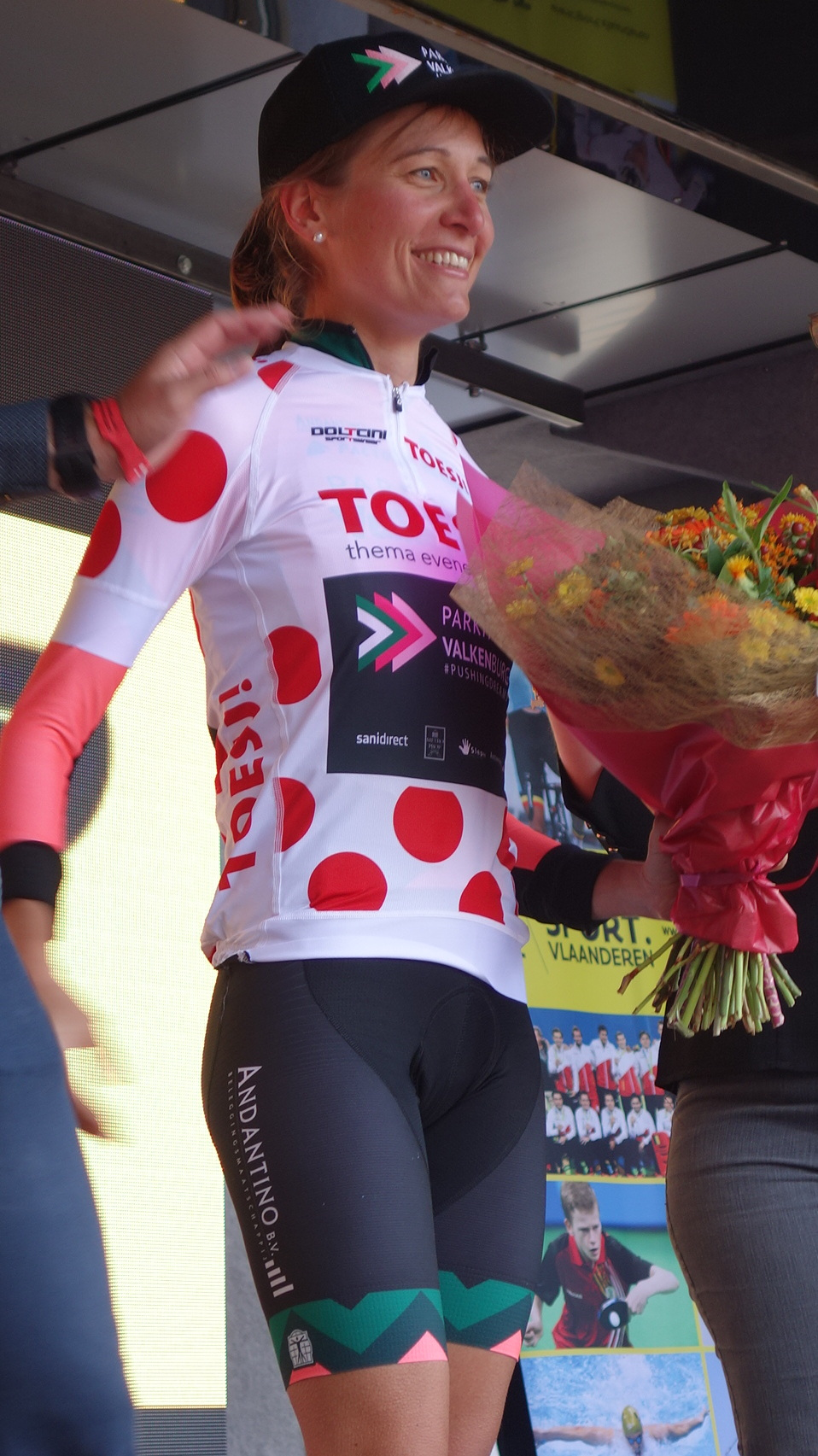 Sofie De Vuyst won de bolletjestrui van het bergklassement na de laatste etappe in Geraardsbergen van de Lotto Belgium Tour 2019